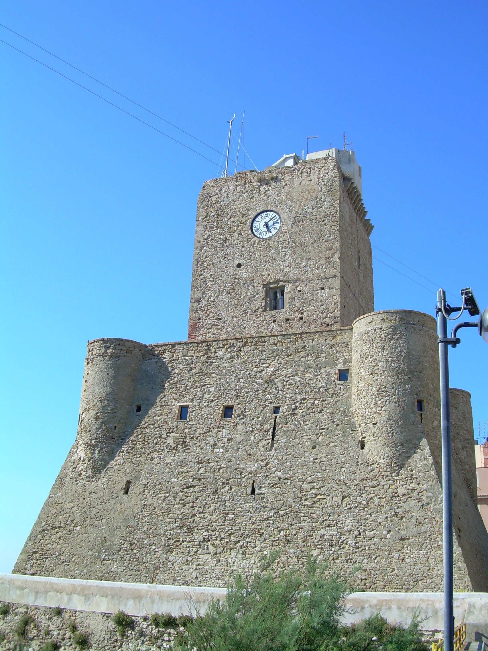 Sono io l'autore della foto e per me è pubblico dominio. [Utente:Elpìs]